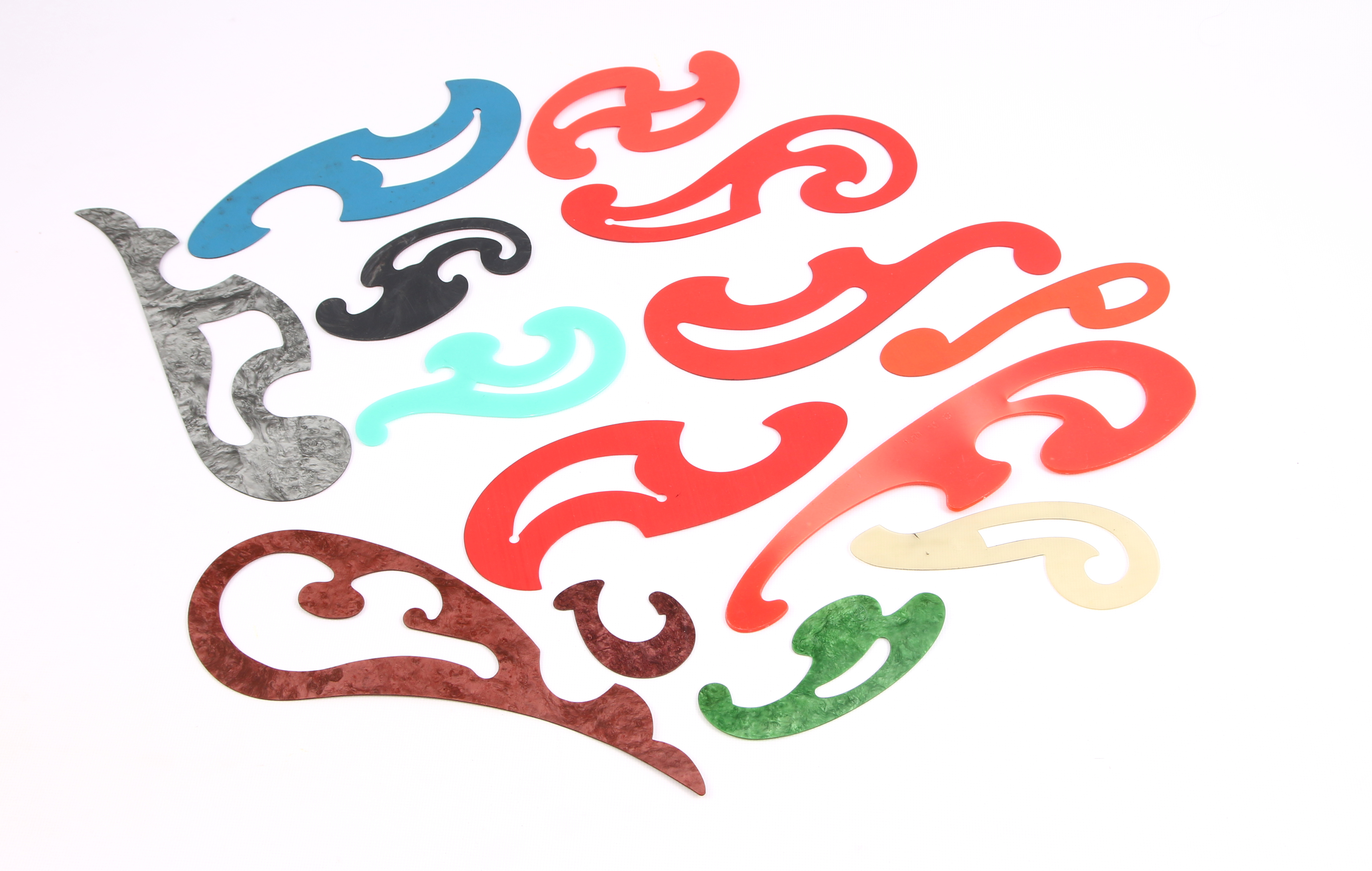 Шаблоны-лекала производства СССР. Пластик с переменным цветом - целлюлоид.